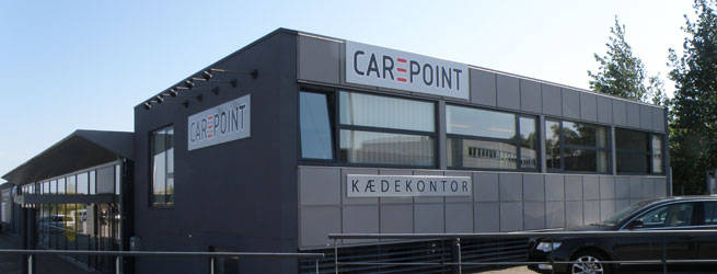 CAREPOINT kædekontor i Viby J